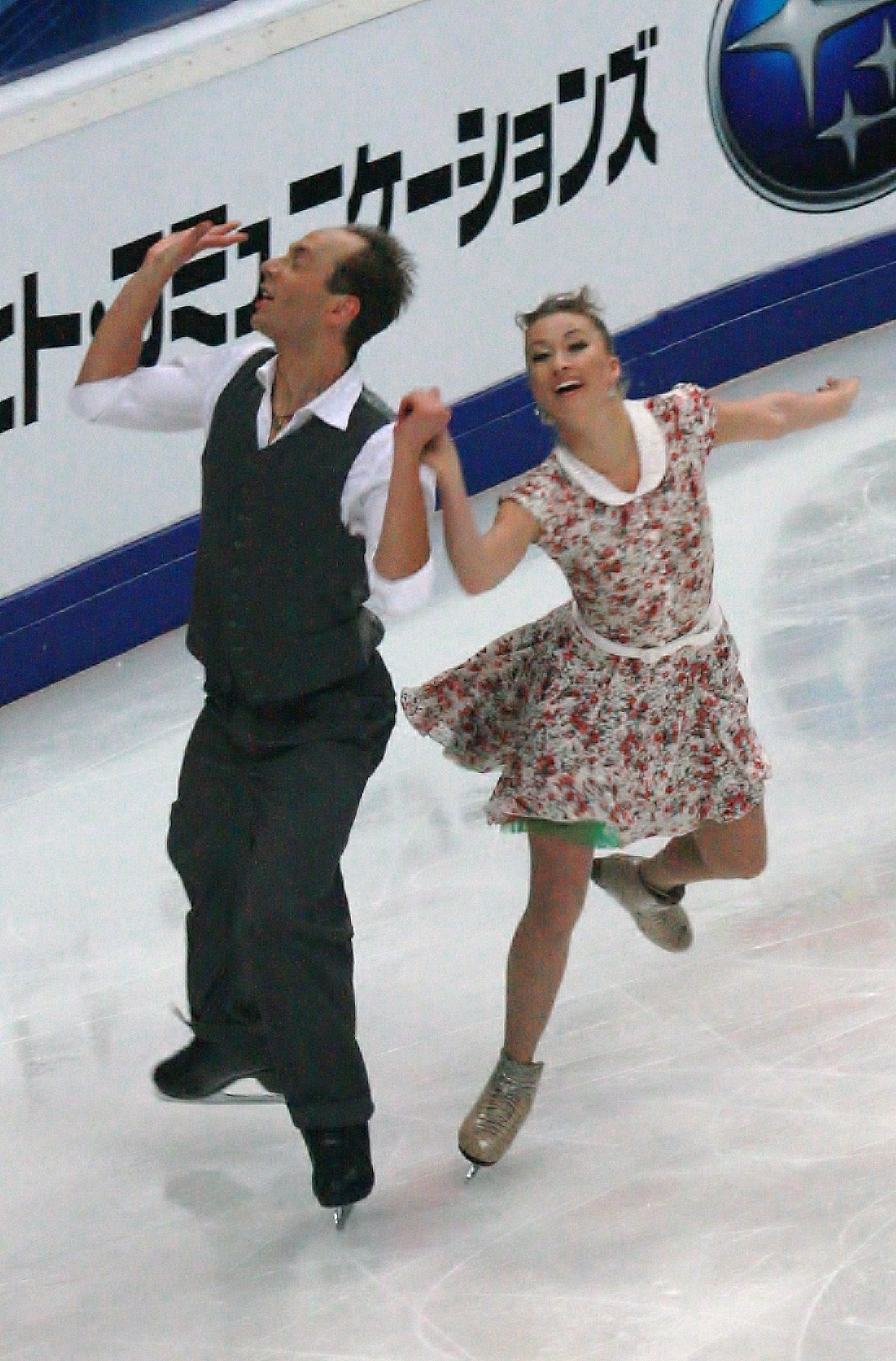 Нелли Жиганшина и Александр Гажи (Германия) на Кубке Ростелекома 2012. Короткий танец.